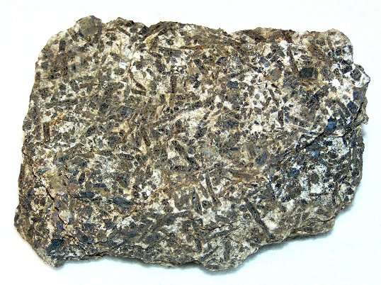 Cieszynit - skała magmowa Autor: Maciej Dembiniok